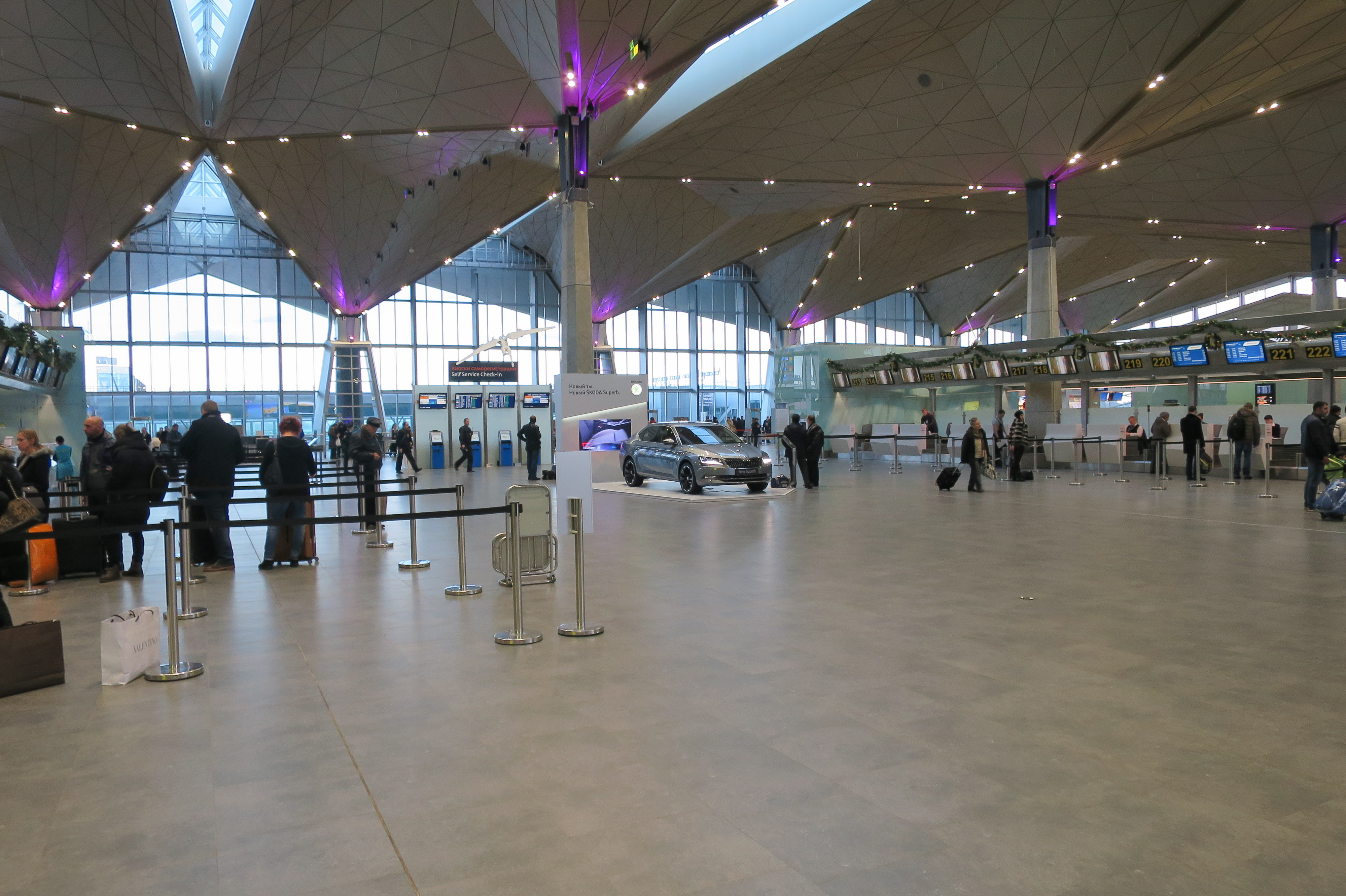 Le hall des départs de l'aéroport de Saint-Pétersbourg (Aéroport international Pulkovo) / Saint-Pétersbourg, Russie